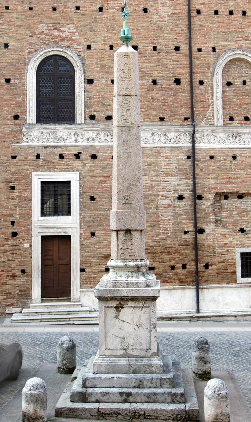 Urbino obelisk